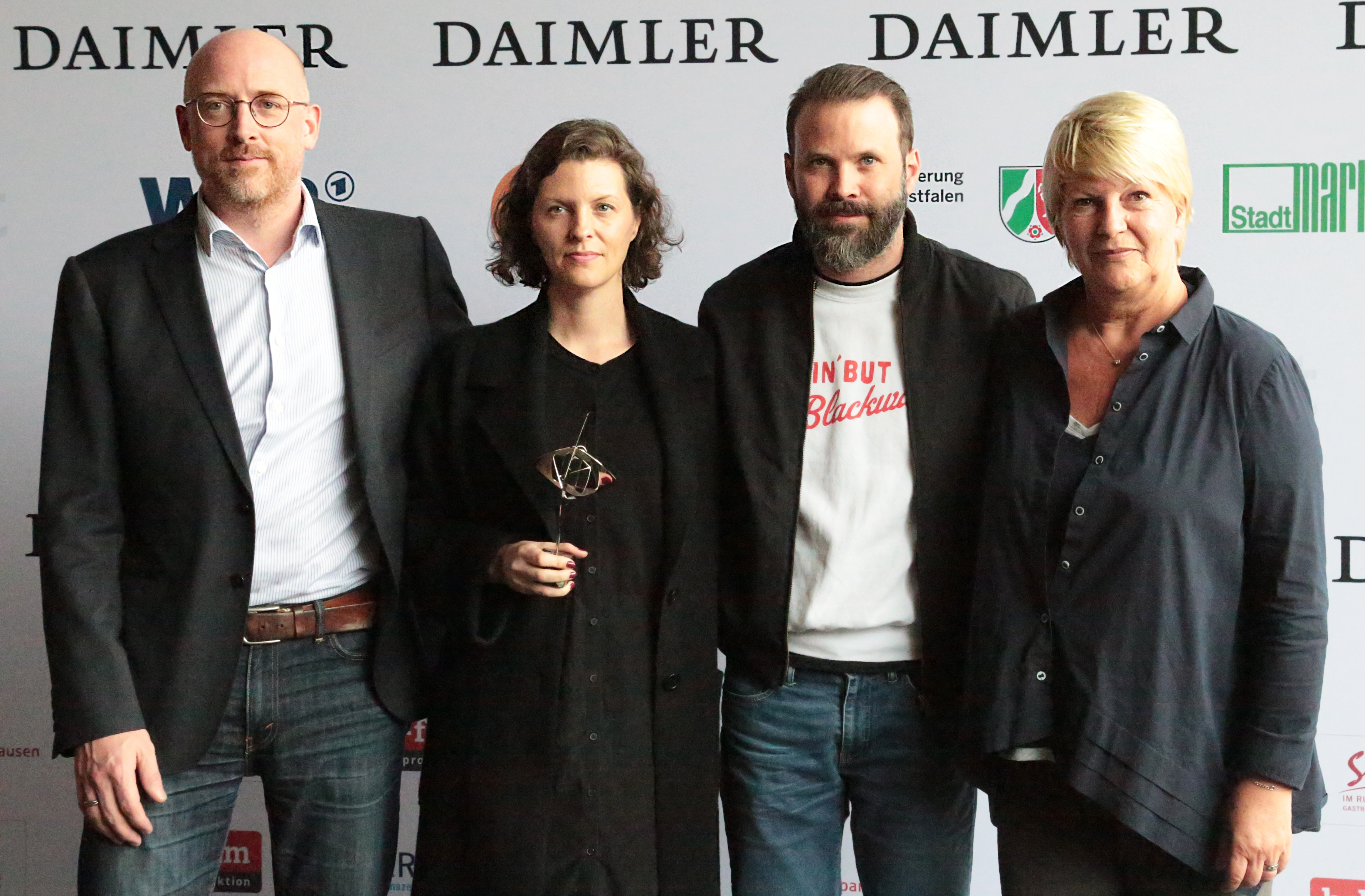 Udo Kramer, Jantje Friese, Baran bo Odar und Simone Bär (Dark) beim Grimme-Preis 2018, am 13.04.2018 in Marl.